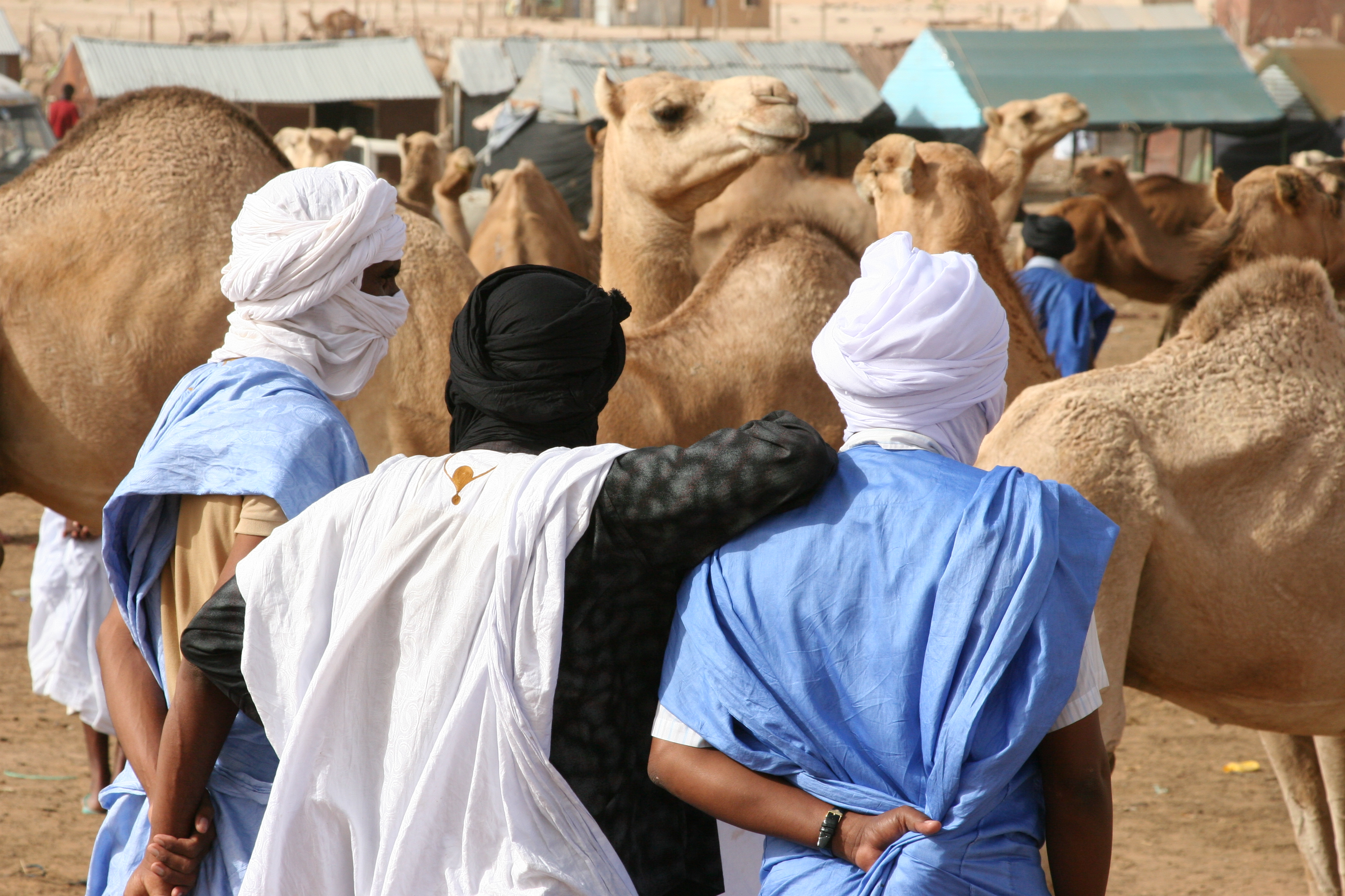 Mauritania, september 2008